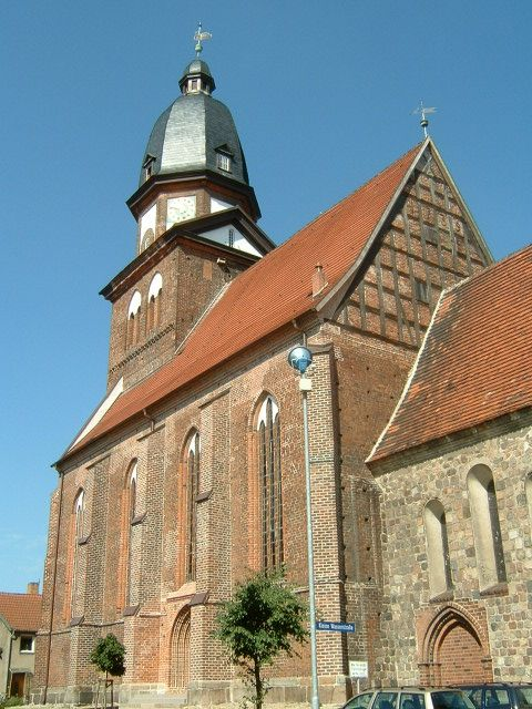 Kirche in Waren / Müritz